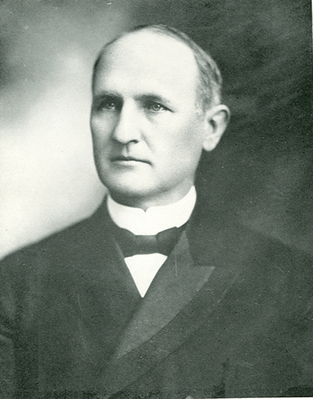 Der fünfzigste Gouverneur von Nord-Carolina Charles Brantley Aycock (1859-1912) Bildquelle: SERIES FP2. Photographic Archives. North Carolina Collection, University of North Carolina at Chapel Hill.